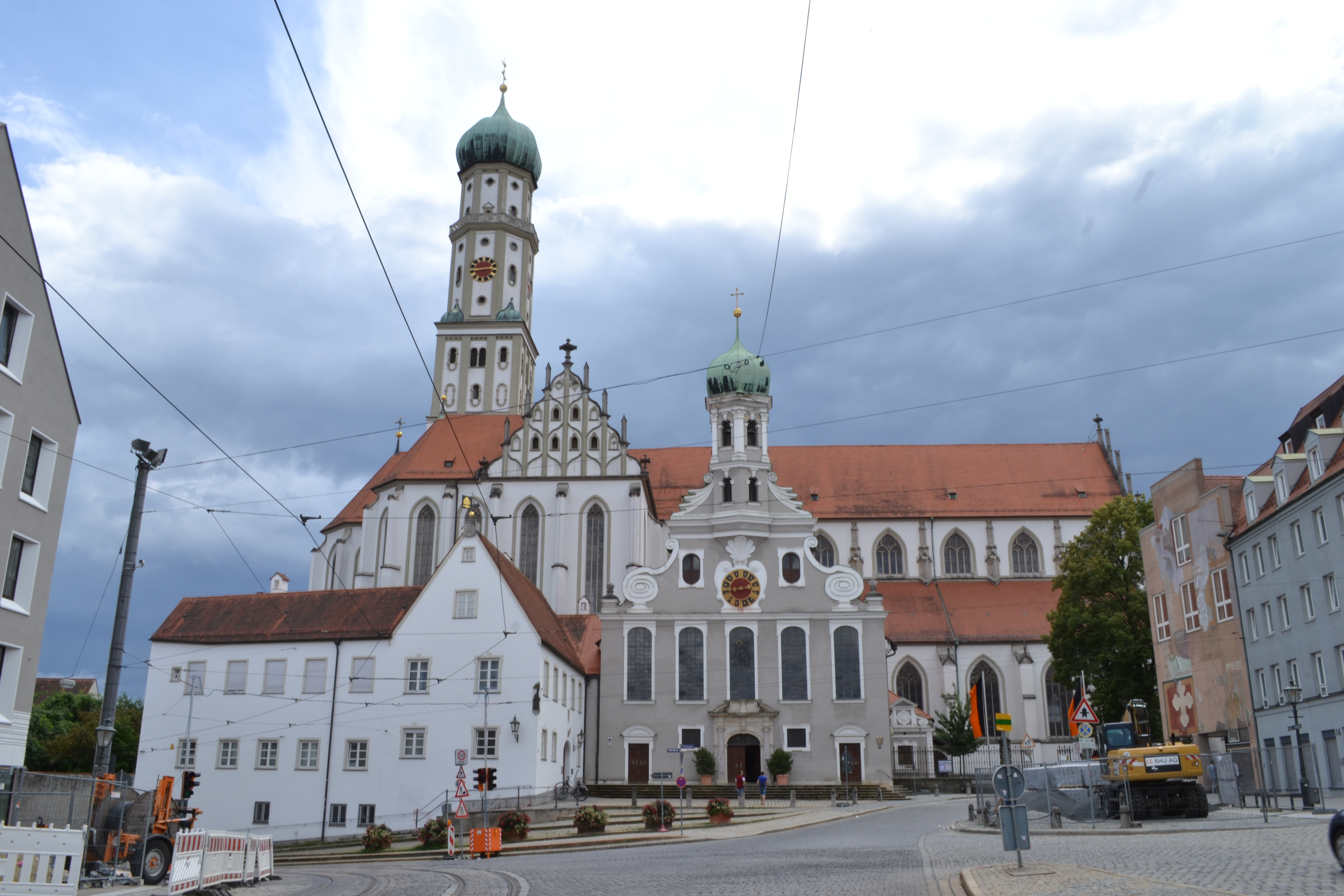 Die katholische Ulrichskirche und die evangelische Ulrichskirche vom Ulrichsplatz in Augsburg.